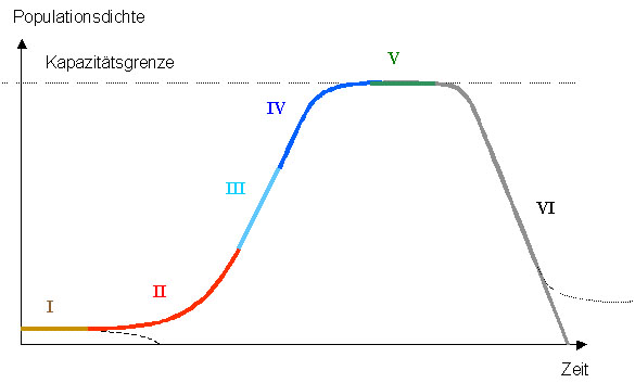 Logistisches Wachstum; selbst erstellt; Lizenzstatus: GNU FDL